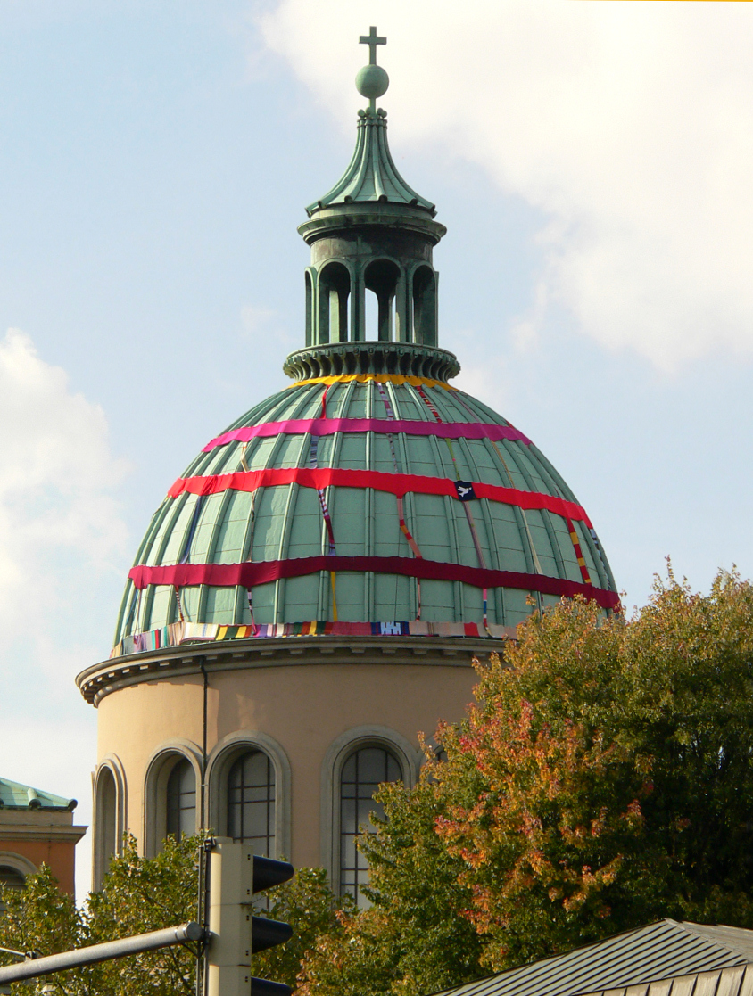 Basilika St. Clemens